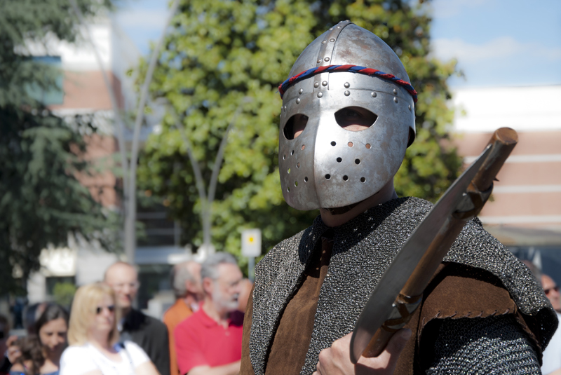 Sfilata storica per il Palio di Legnano 2013